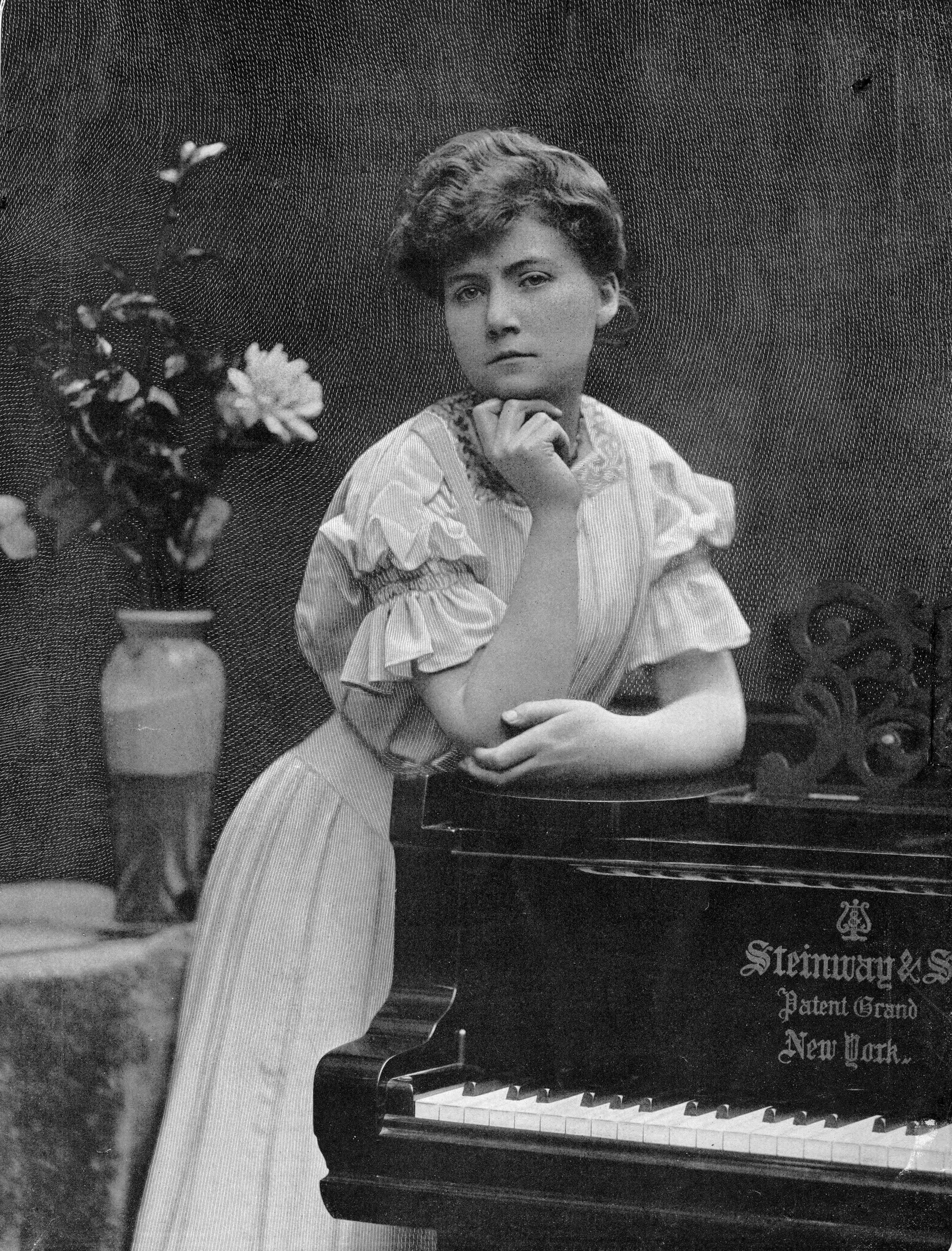 Magdeleine Boucherit Le Faure par Eugène Pirou